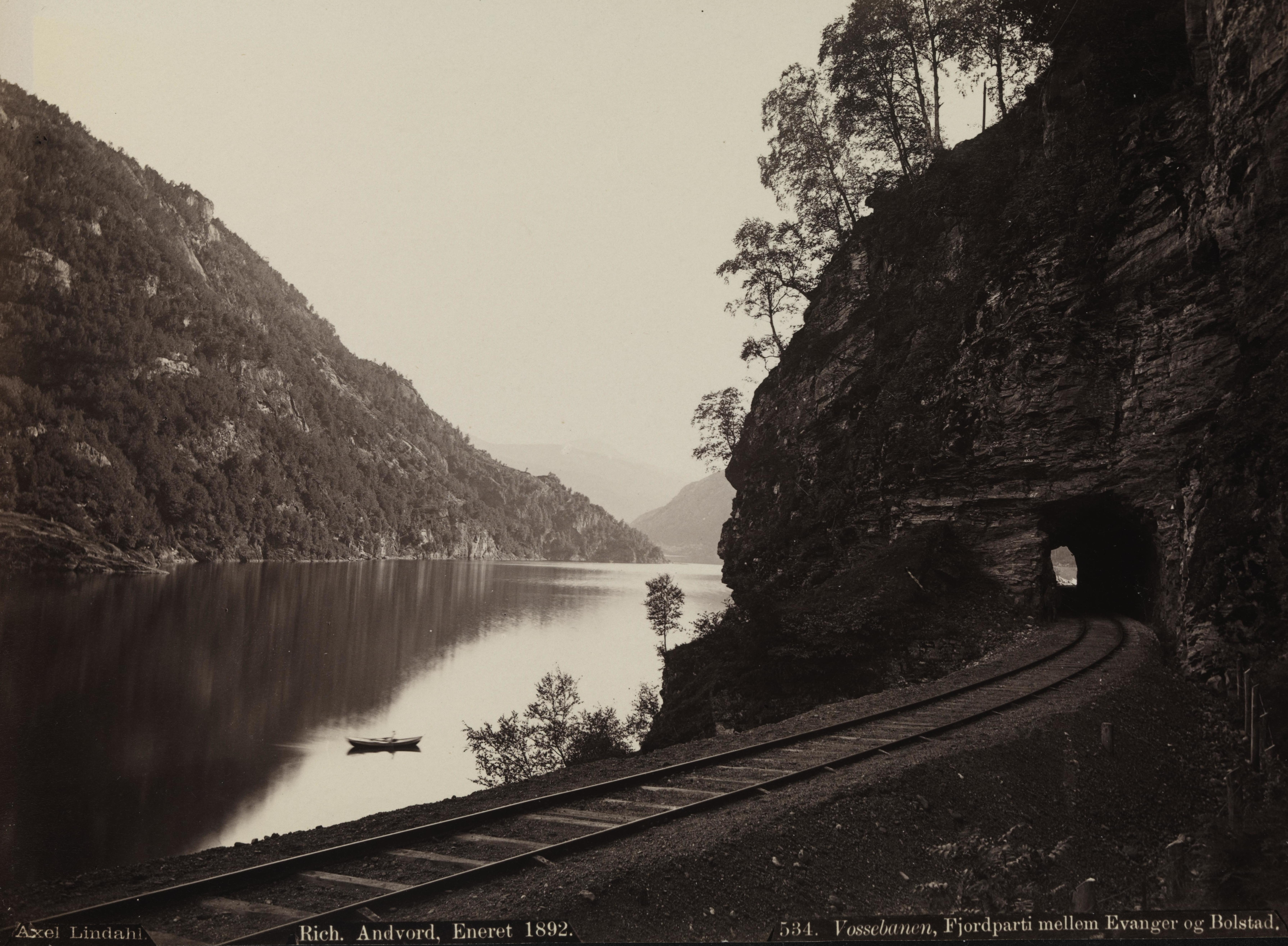 Bildet er hentet fra Nasjonalbibliotekets bildesamling Evangervatnet, Voss, Hordaland